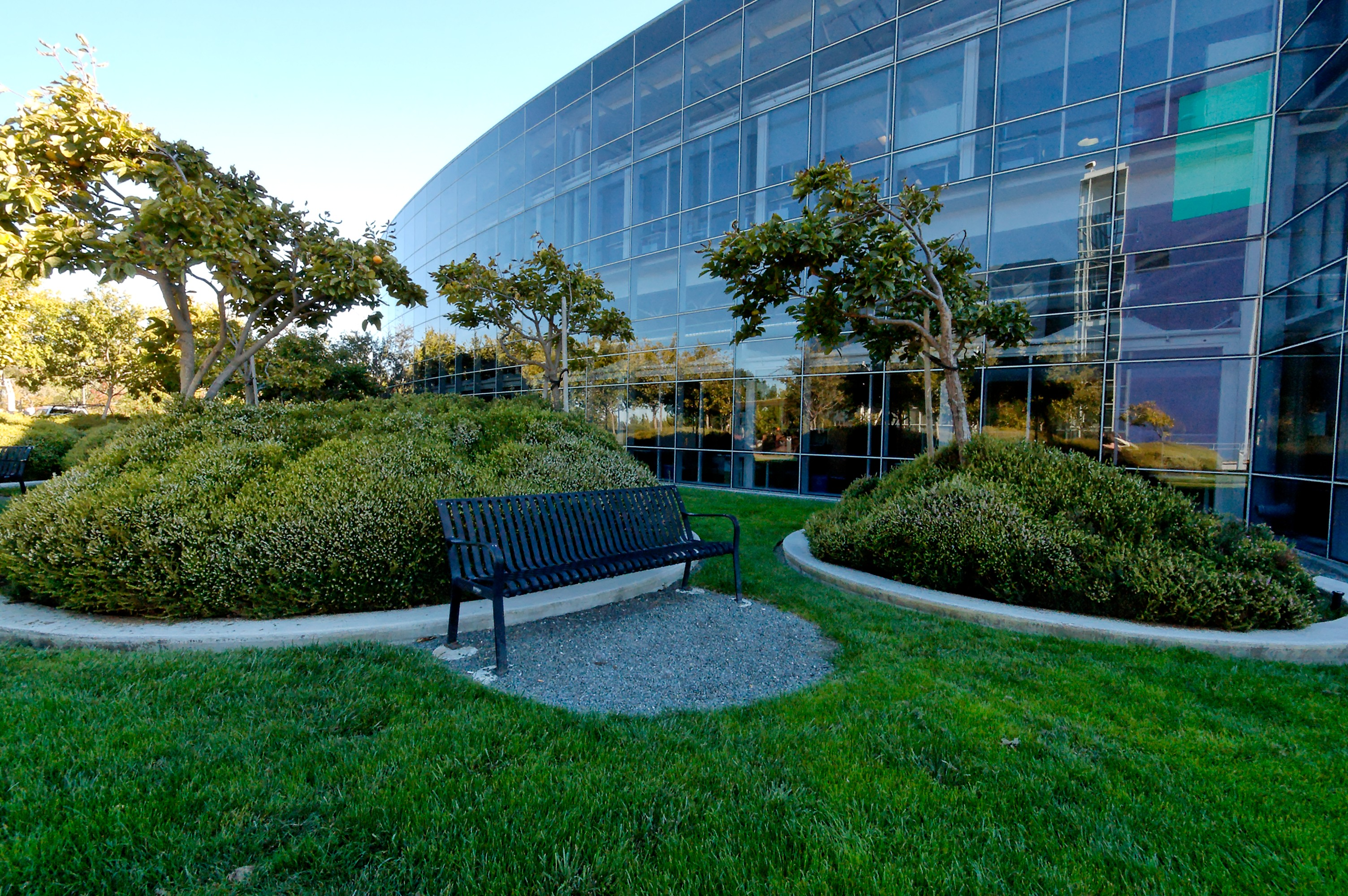 Google Campus